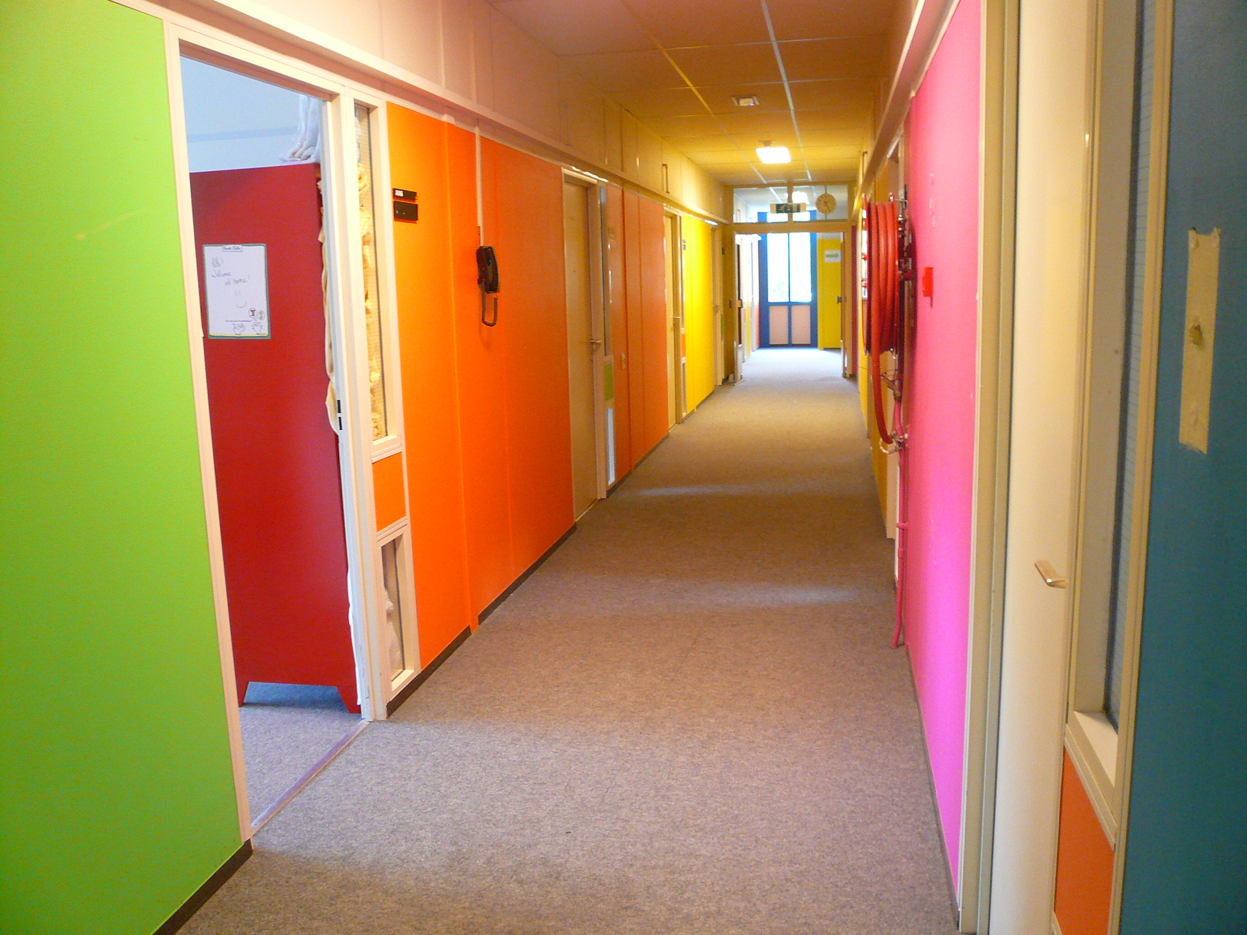 Couloir multicolore